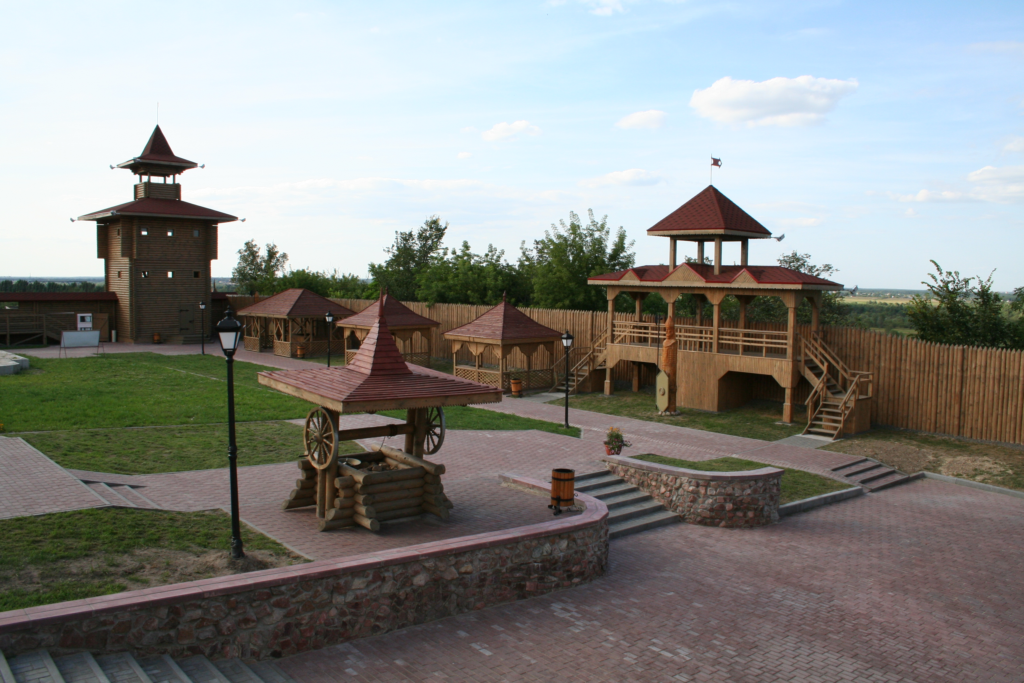 Беларуская (тарашкевіца): Гістарычны цэнтр г. Мазыра:будынкі і збудаваньні, пляніровачная структура, ляндшафт і культурны пласт на тэрыторыі, абмежаванай з поўначы — набярэжная р. Прыпяць,з захаду — пл. Леніна і вул. Ленінская,з поўдня — роў і зав. Фрунзе,з усходу — вул. Калініна. г. Мазыр This is a photo of Belarusian heritage monument. Reference number: 312Е000505 ( WLM)